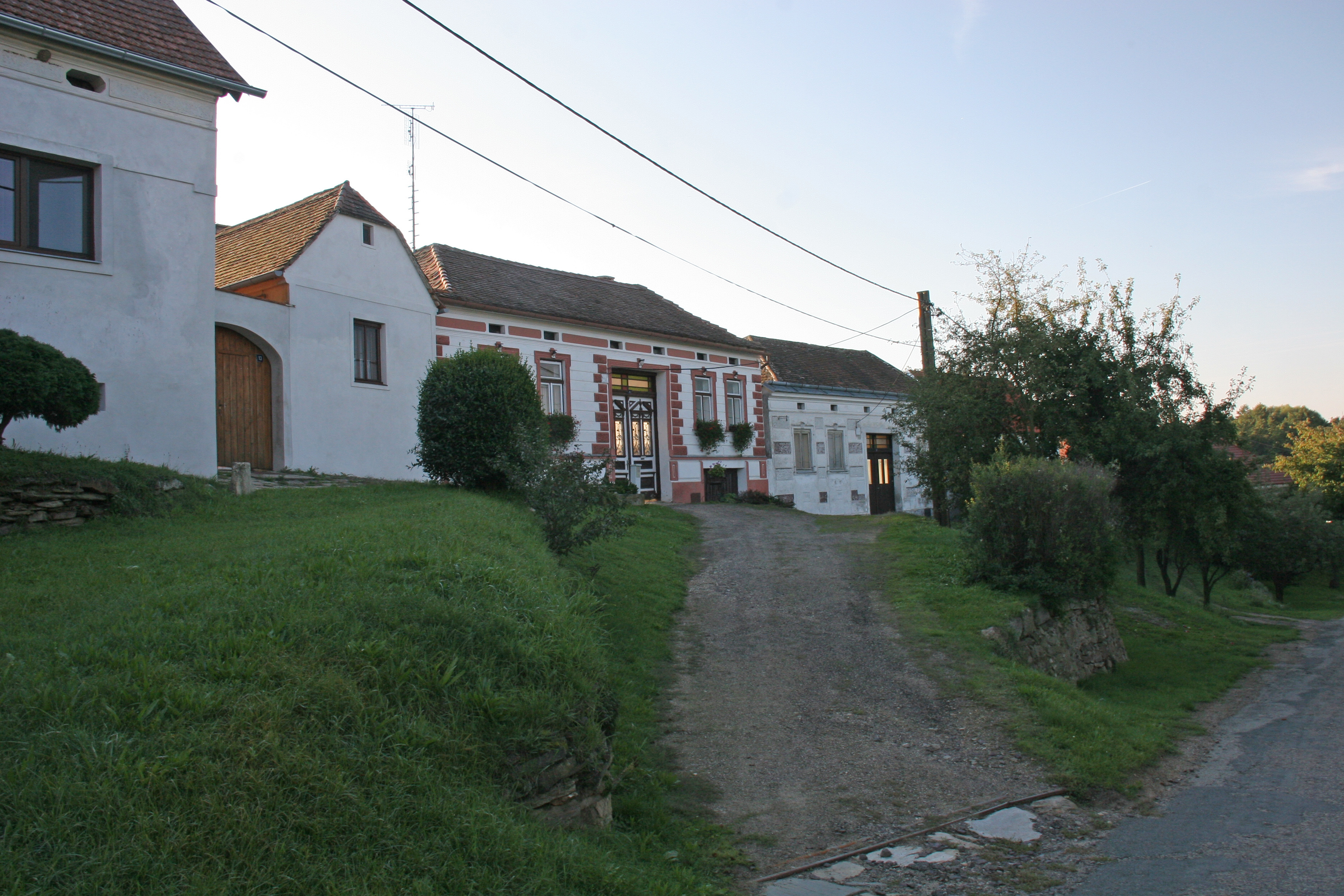 Lukov čp. 14